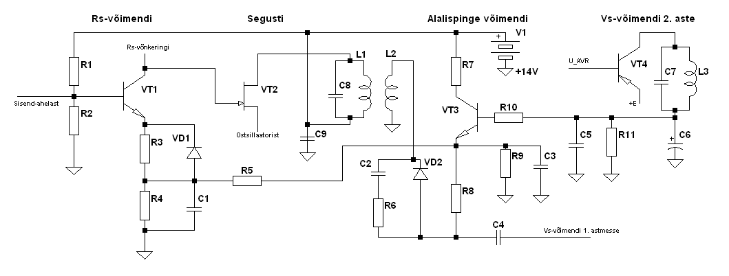 AVR negatiivse tagasisidega signaalile